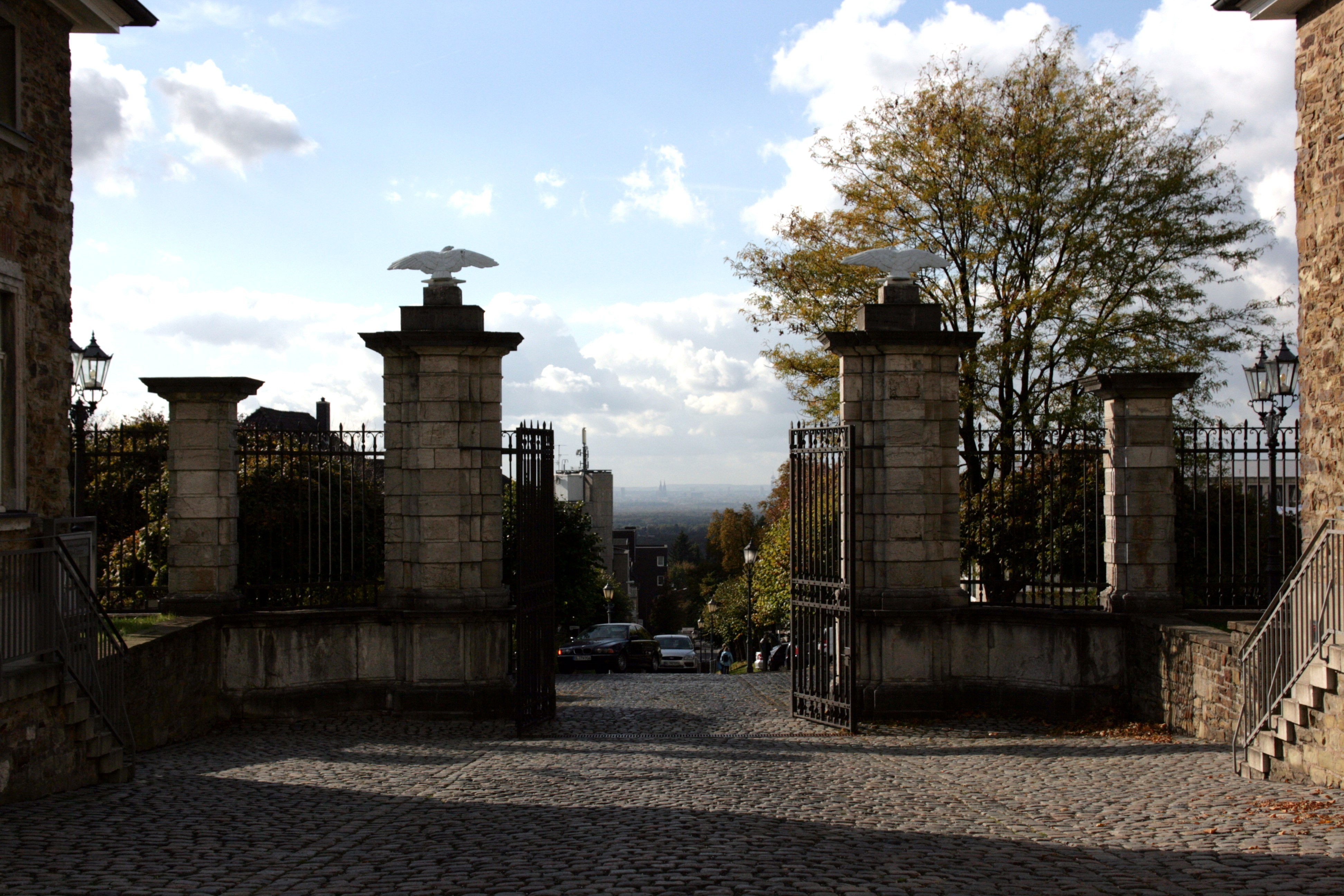 Schloss Bensberg, Kadettenstraße 1 in Bergisch Gladbach